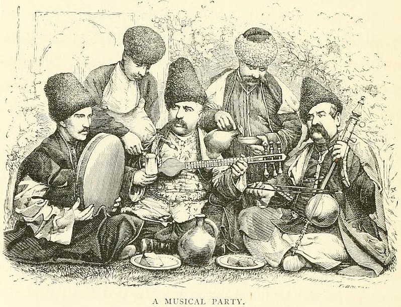 армянские музыканты